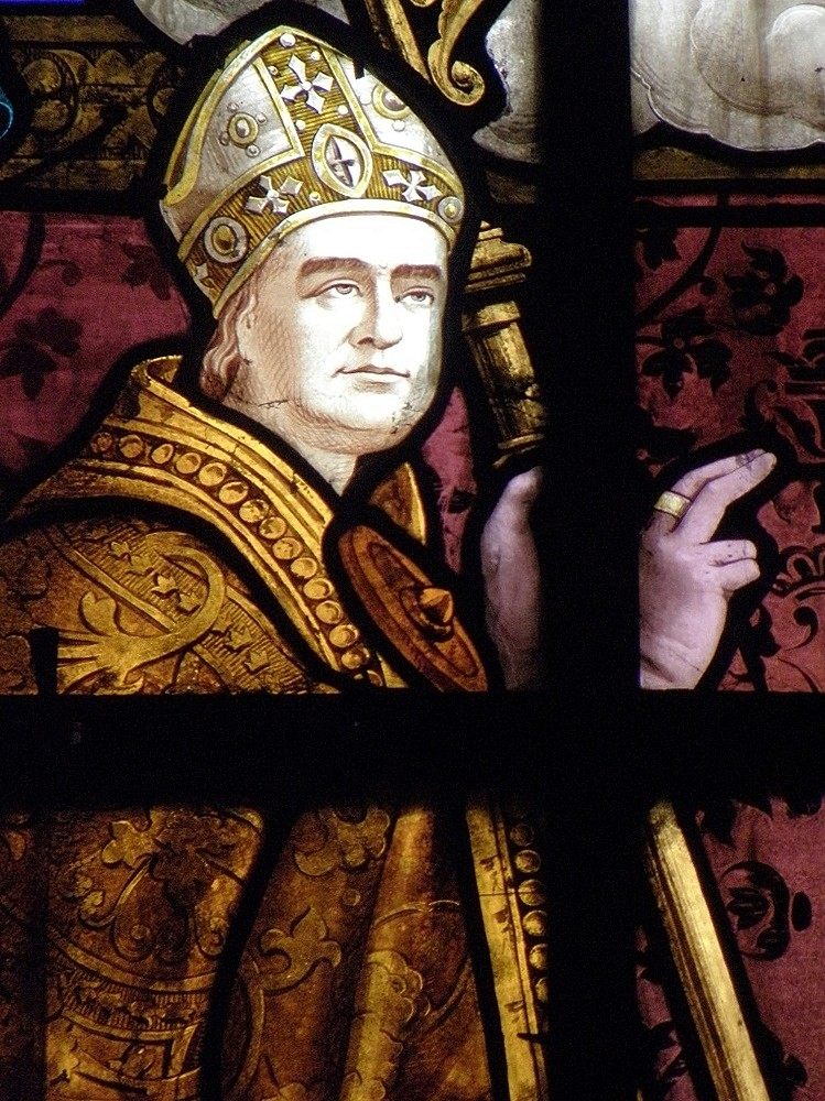 Mgr Labouré, archevêque de Rennes. Détail de la baie 6 de la basilique Notre-Dame de La Guerche-de-Bretagne (35).